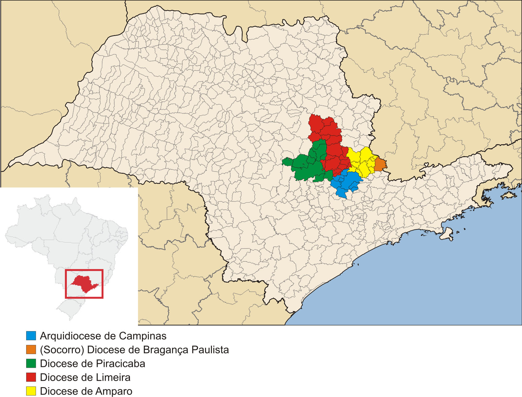 Mapa da Diocese de Campinas, SP., Brasil